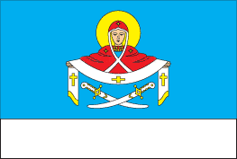 Прапор Покровського району